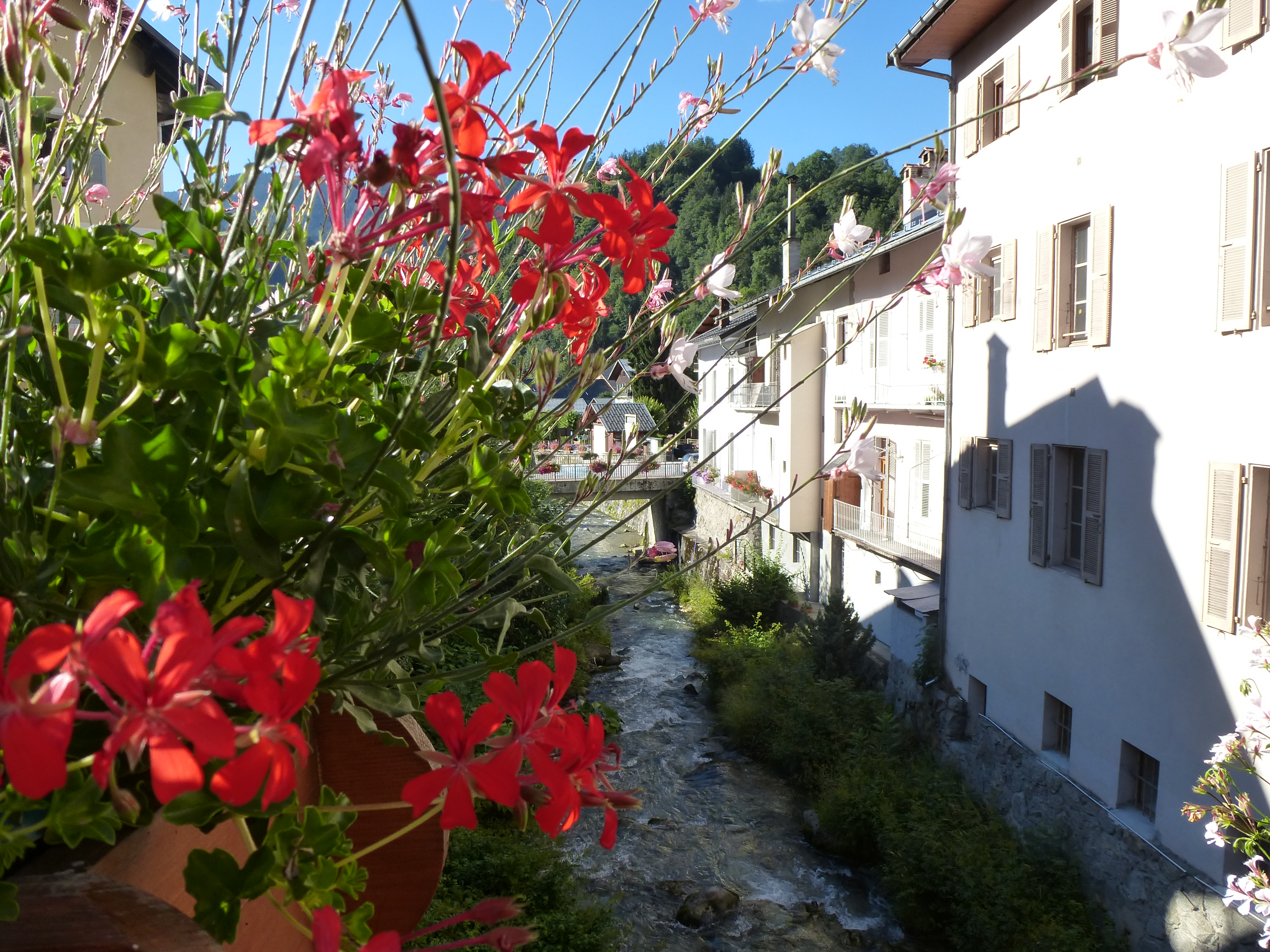 beaufort